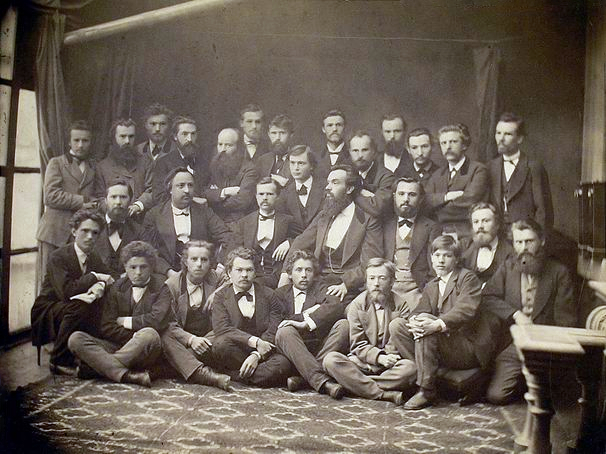 І.Нечуй-Левицький в колі членів "Київської громади"